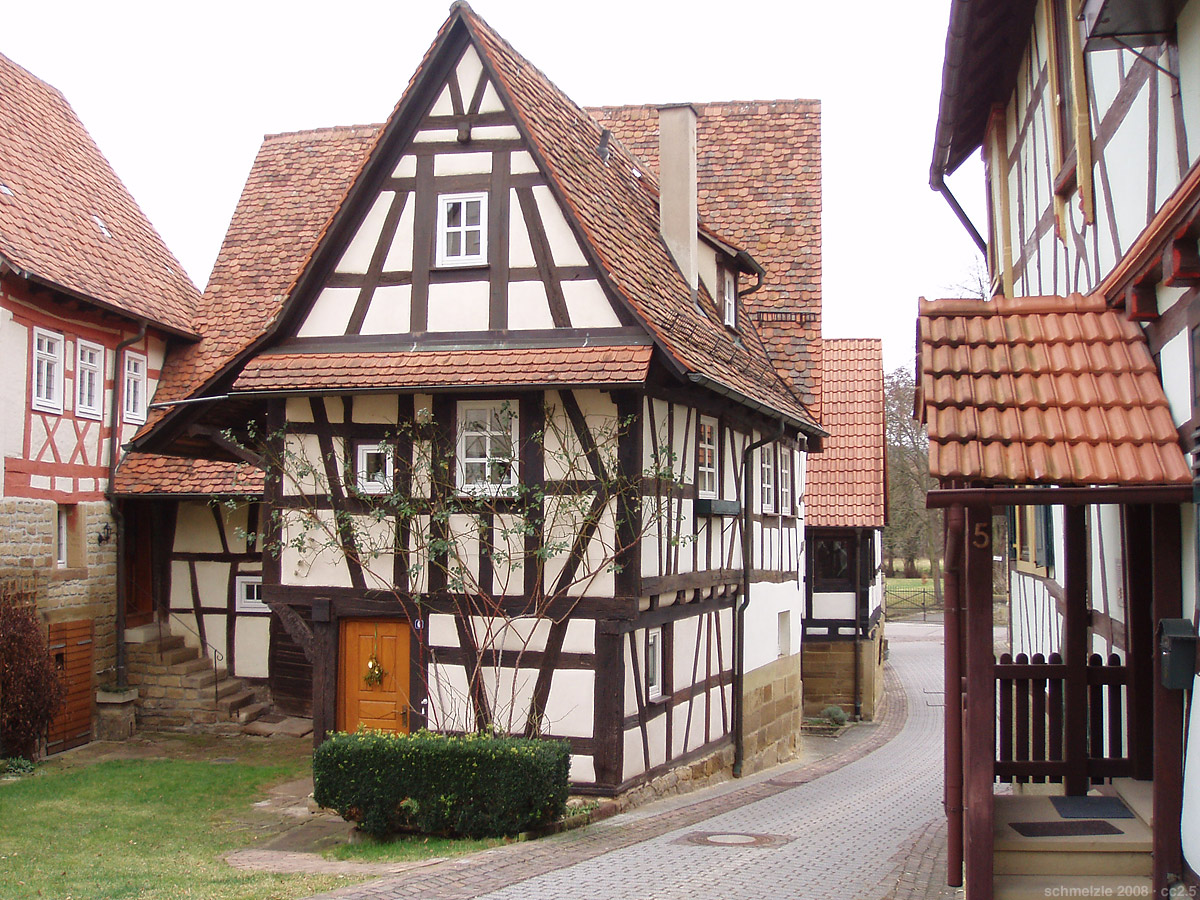 Fachwerkgebäude in der Ortsmitte nahe dem Schloss in Kürnbach